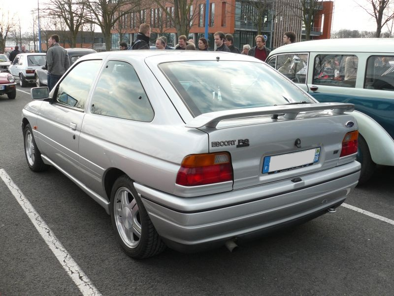 Reims 2012